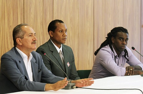 Brasil: Ministro dos Esportes recebe árbitro Márcio Chagas e o jogador Tinga e presta solidariedade a eles por terem sido vítimas de racismo em estádios de futebol.